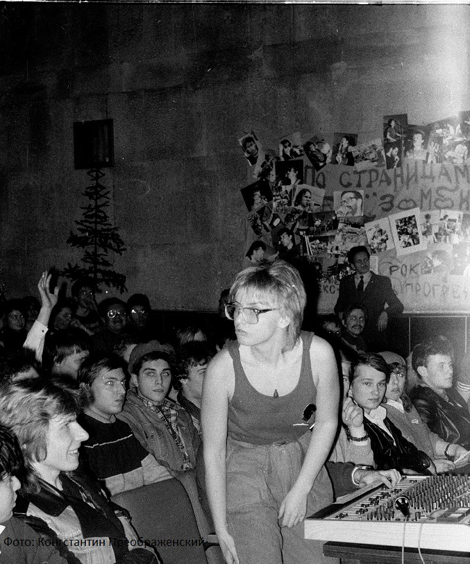 Наталия Ивановна Комарова (Комета)